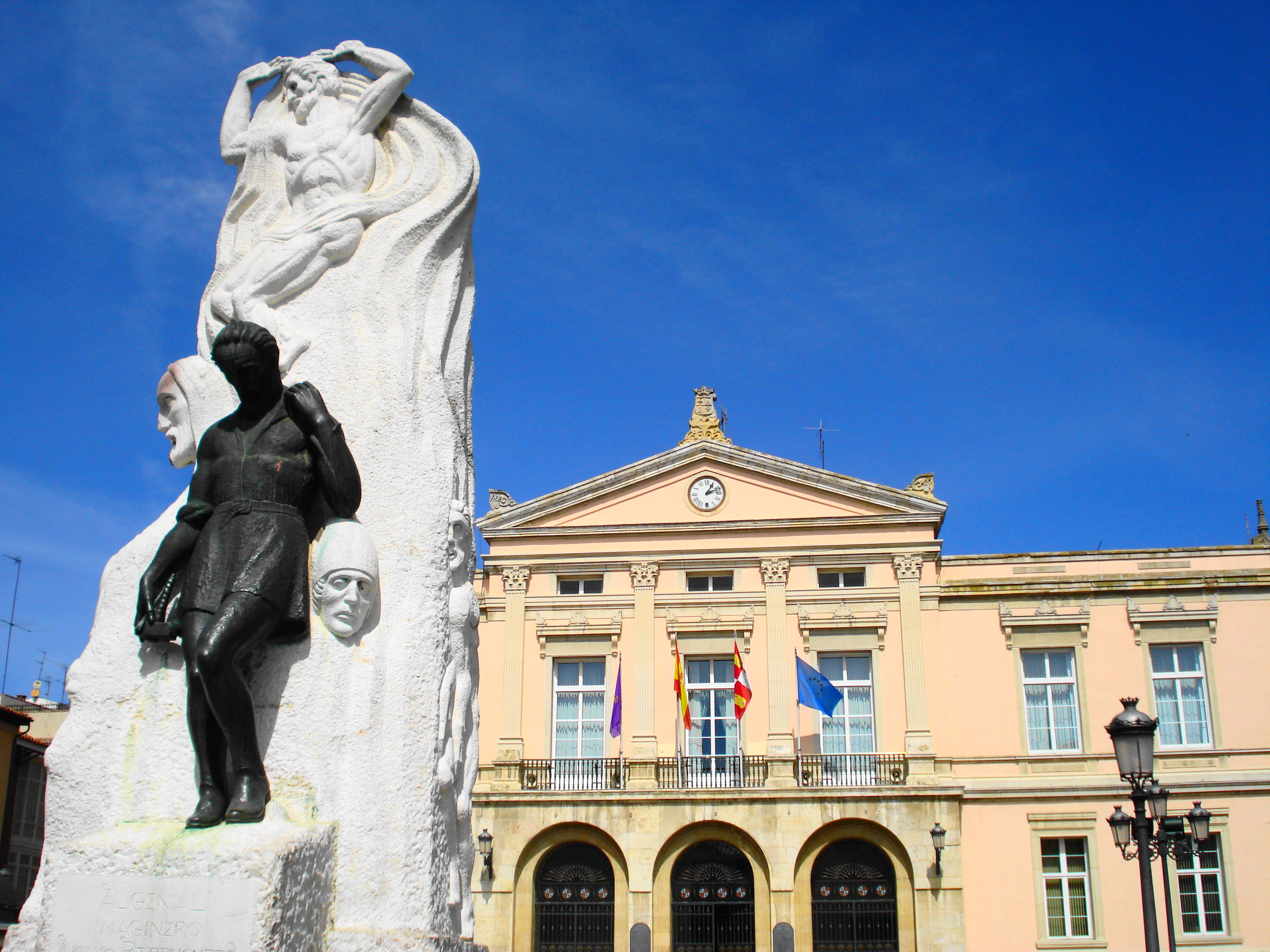 Monumento a Berruguete y Plaza Mayor de Palencia (Castilla y León).